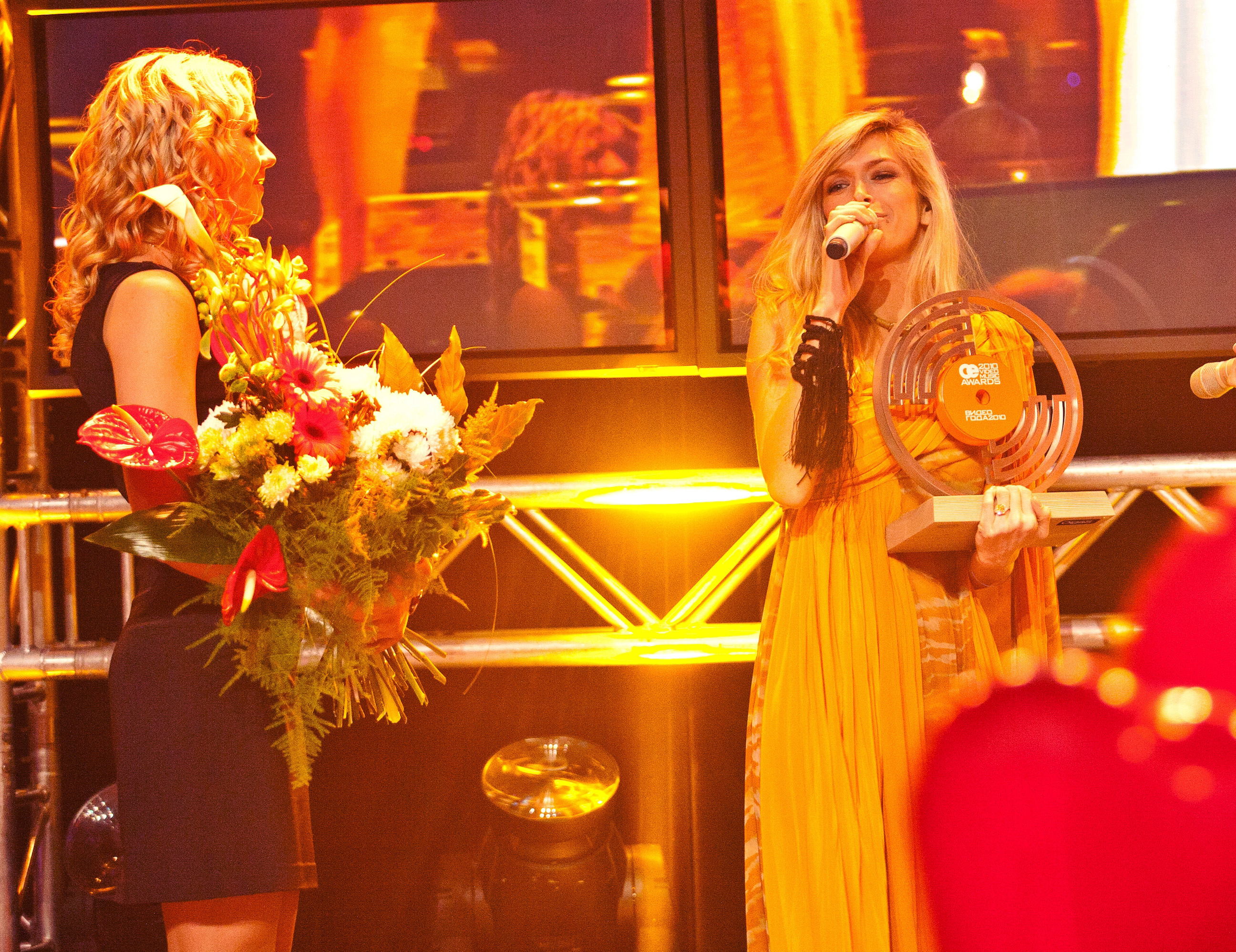 Вера_Брежнева_OEVMA_2010.jpg